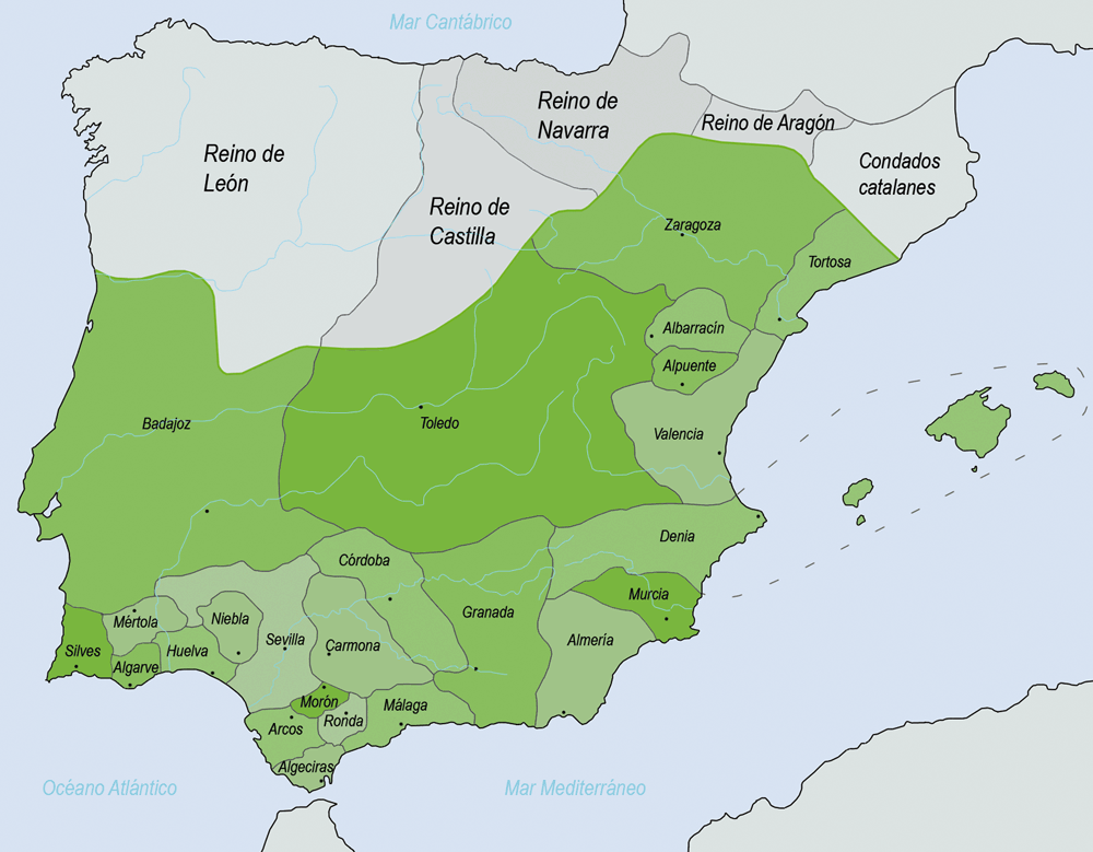 Mapa de los reinos Taifas. Imagen realizada para Wikimedia.